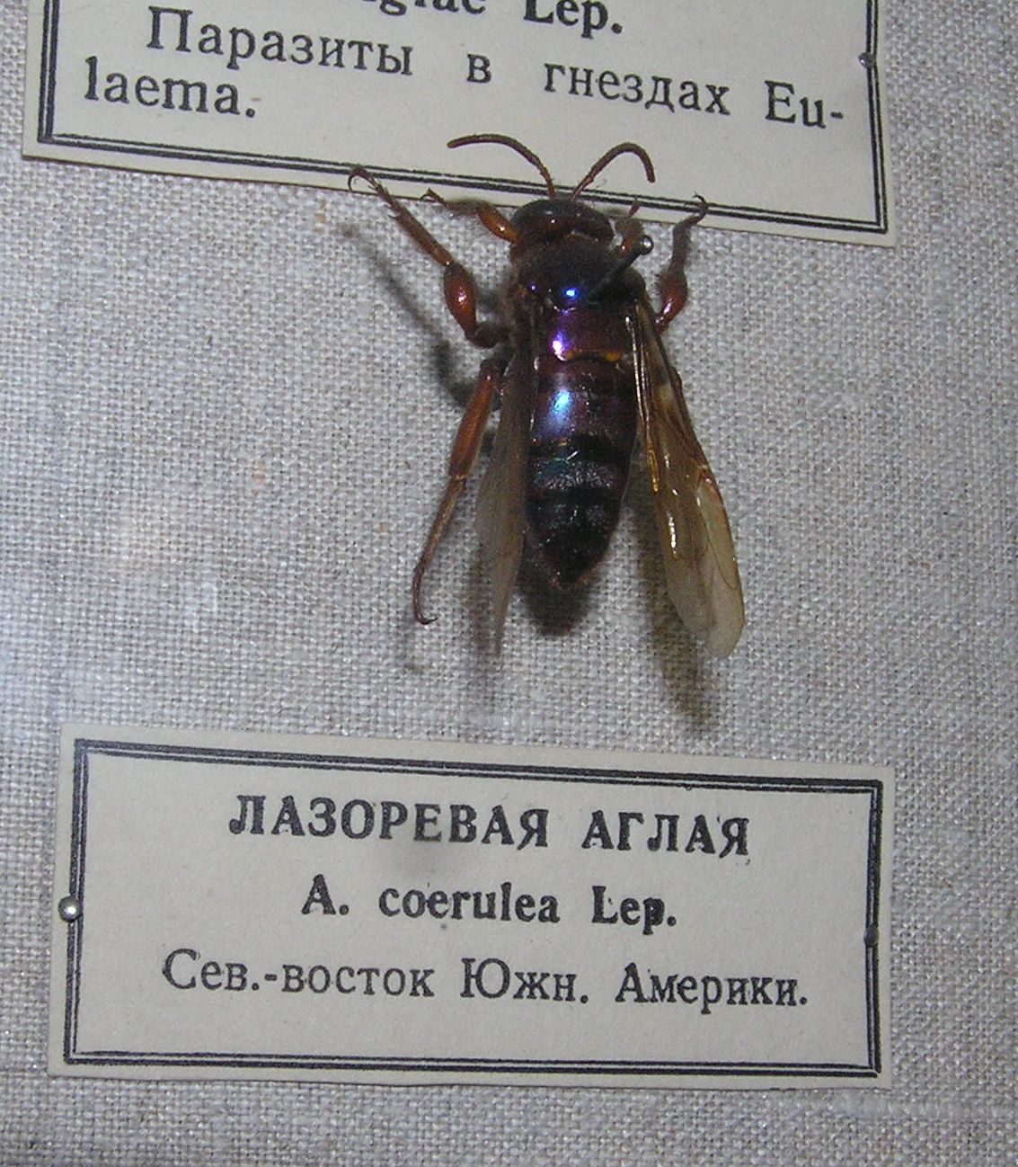 Зоологический музей в Санкт-Петербурге. Лазоревая аглая